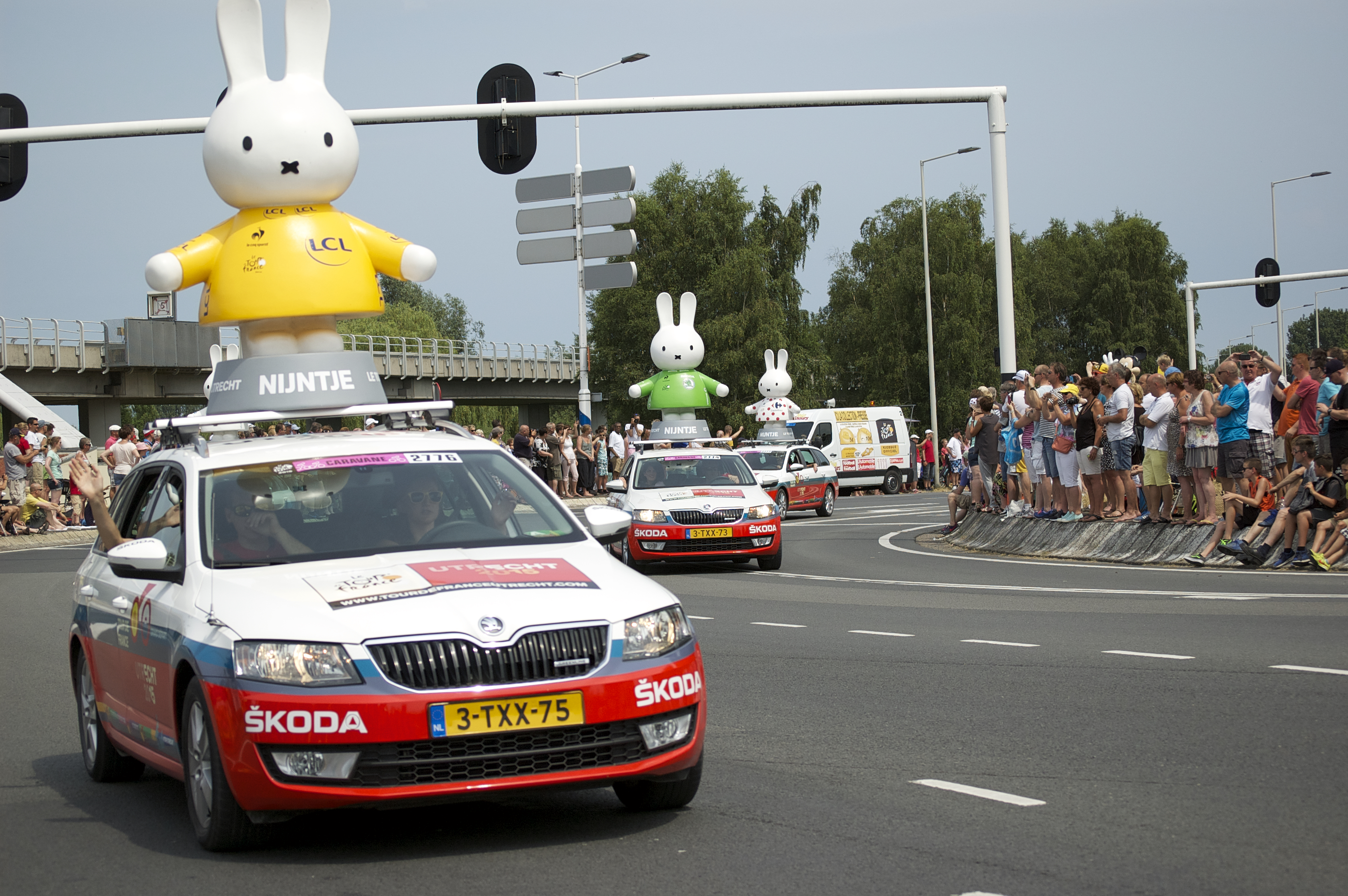 Tourkaravaan, Capelle aan den IJssel.